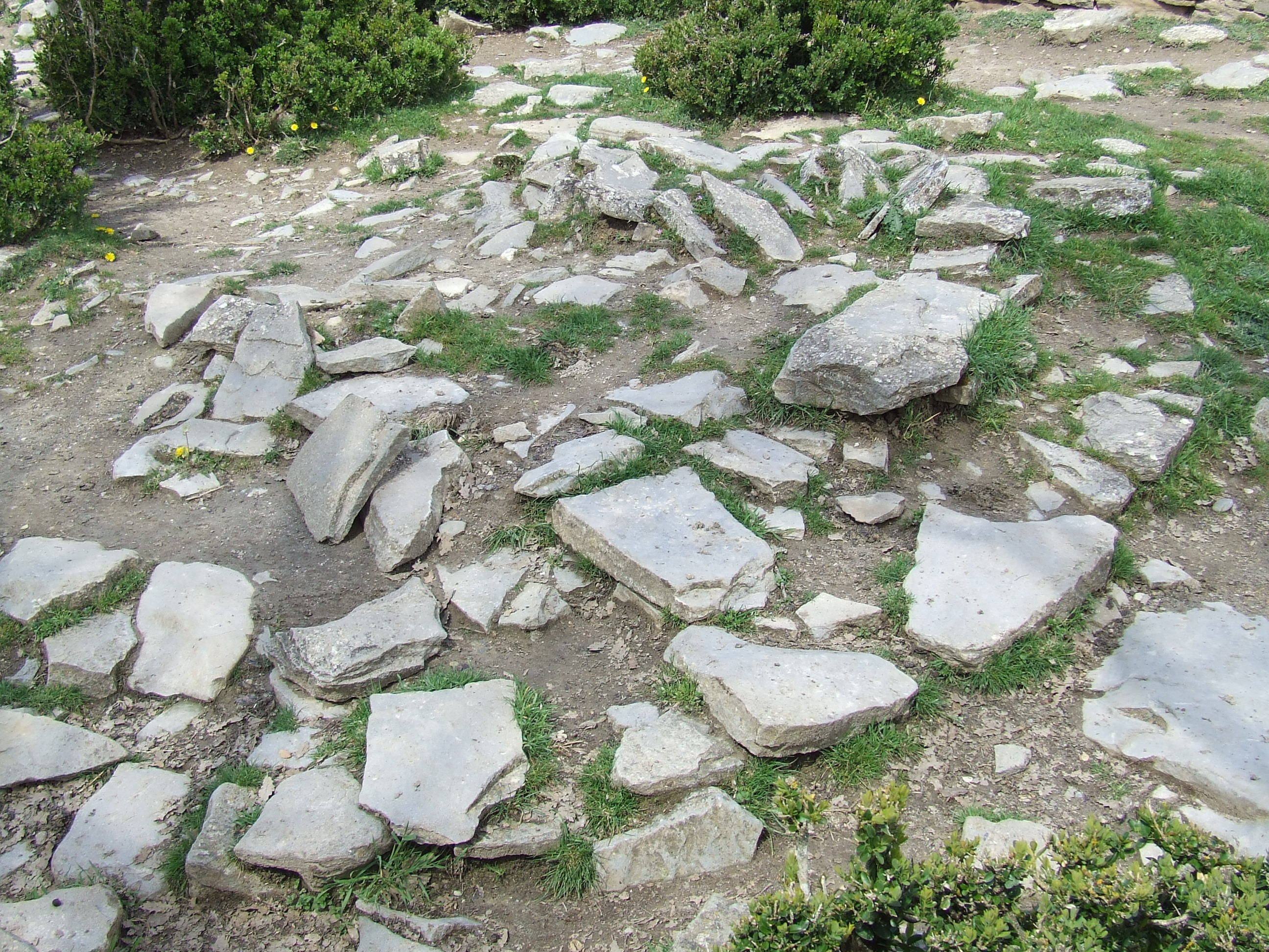 Sant Miquel de Casa Cortit. Perfil de la capçalera (Castissent, Fígols de Tremp, Tremp, Pallars Jussà)